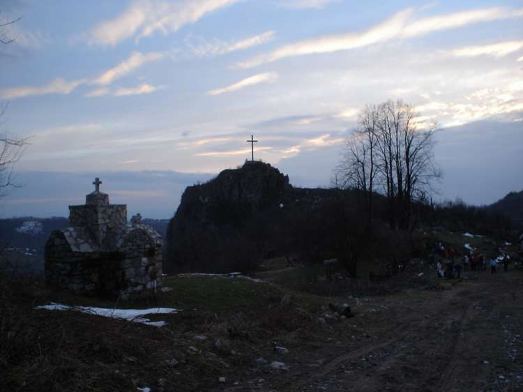 Soko Grad,near Ljubovija